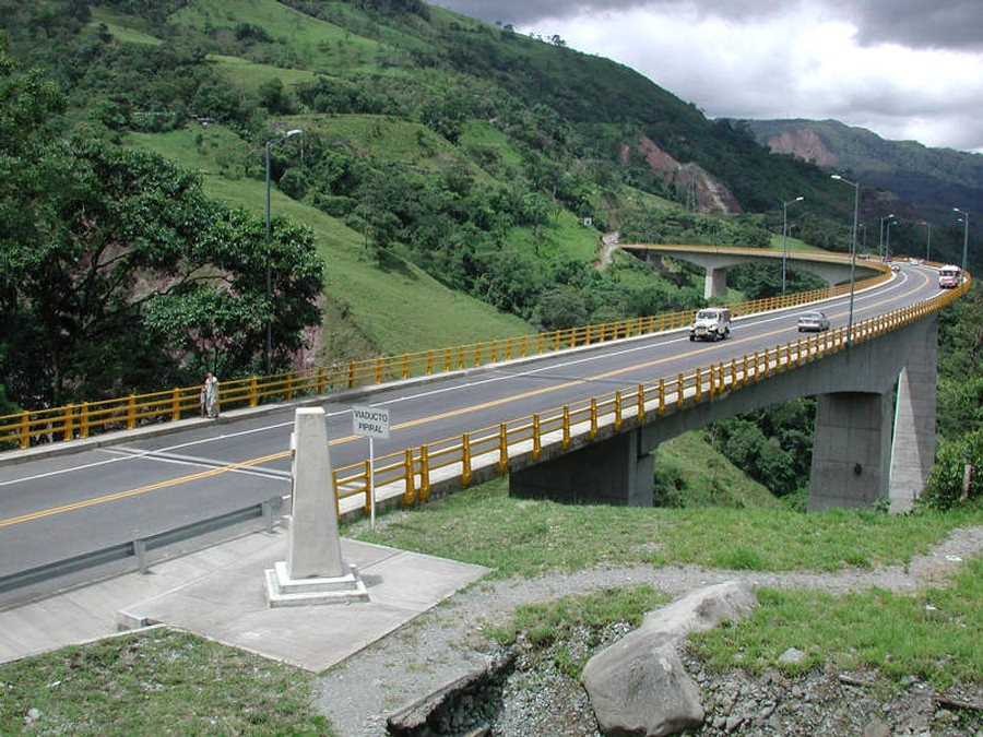 Viaducto